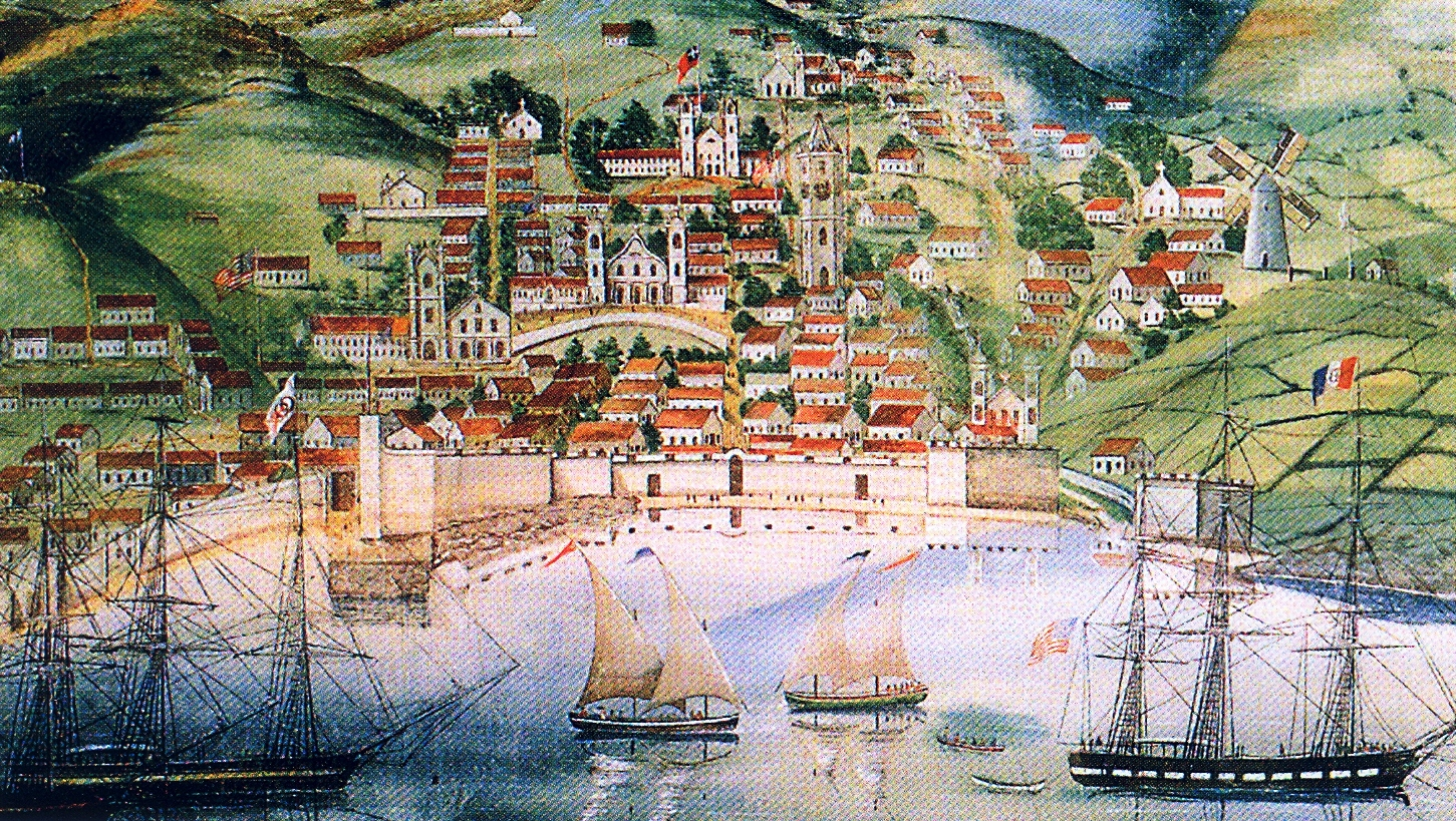 "Vista da Baía da Cidade da Horta na Ilha do Faial" (detalhe). Benjamin Russell & Caleb Purrington. "Whaling Voyage 'Round the World". ca. 1848. New Bedford Whaling Museum. In: VIEIRA, João A. Gomes. "O Homem e o Mar: Embarcações dos Açores". Lisboa: Intermezzo-Audiovisuais, Lda., 2002. 194p. il. ISBN 972-96058-6-6